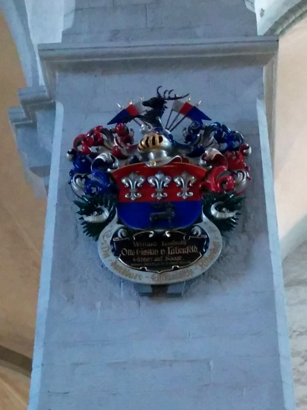 Otto Gustav von Lilienfeldi vappepitaaf Tallinna Toomkirikus